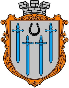 Герб Люблинецької селищної територіальної громади